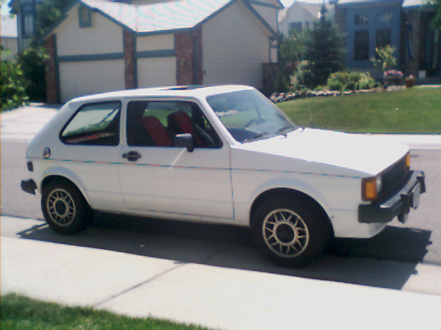 US-VW Rabbit GTi, Bj 1984. Wird zwar auch hier verwendet, macht aber nix, die haben die Bilder auch nur von mir ;)